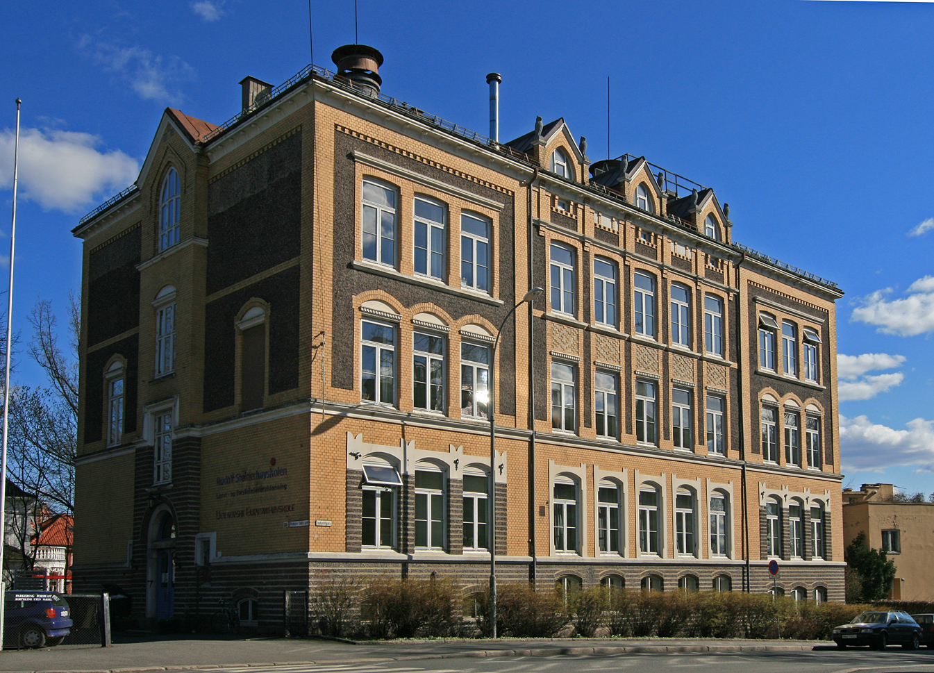 Berle pigeskole, Professor Dahls gate 30, Oslo. Bygd 1897; arkitekt Halfdan Berle. I dag Rudolf Steinerhøyskolen.